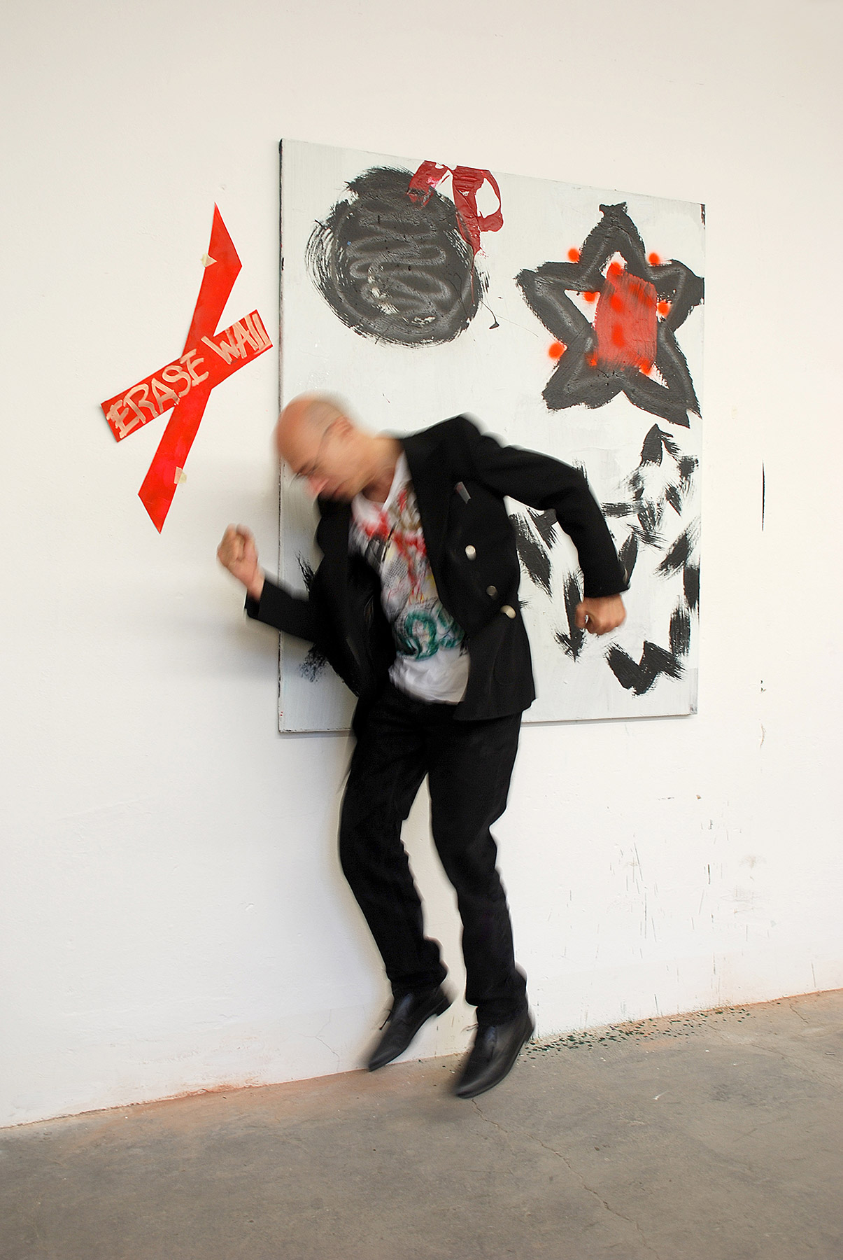 Der Künstler ter Hell 2009 im Freien Museum Berlin – Portrait von Frank Benno Junghanns (Kunstwirt)